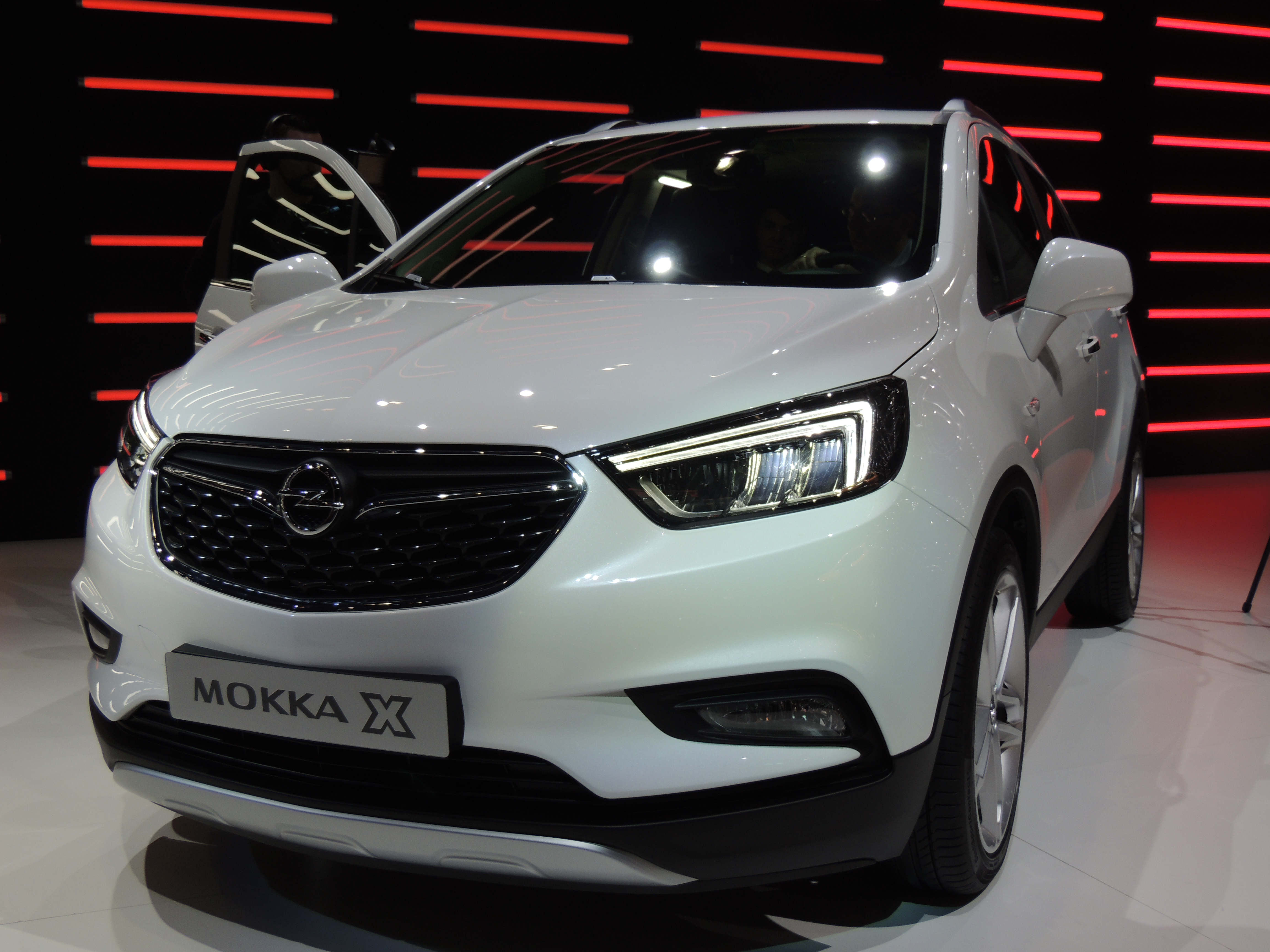 Opel Mokka X, salon de Genève 2016